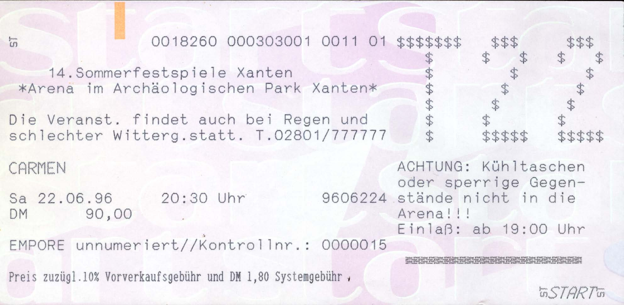 Eintrittskarte für "Carmen" in der Arena des Archäologischen Parks Xanten, ausgestellt von einem Reisebüro über ein Terminal der "START Datentechnik für Reise und Touristik"